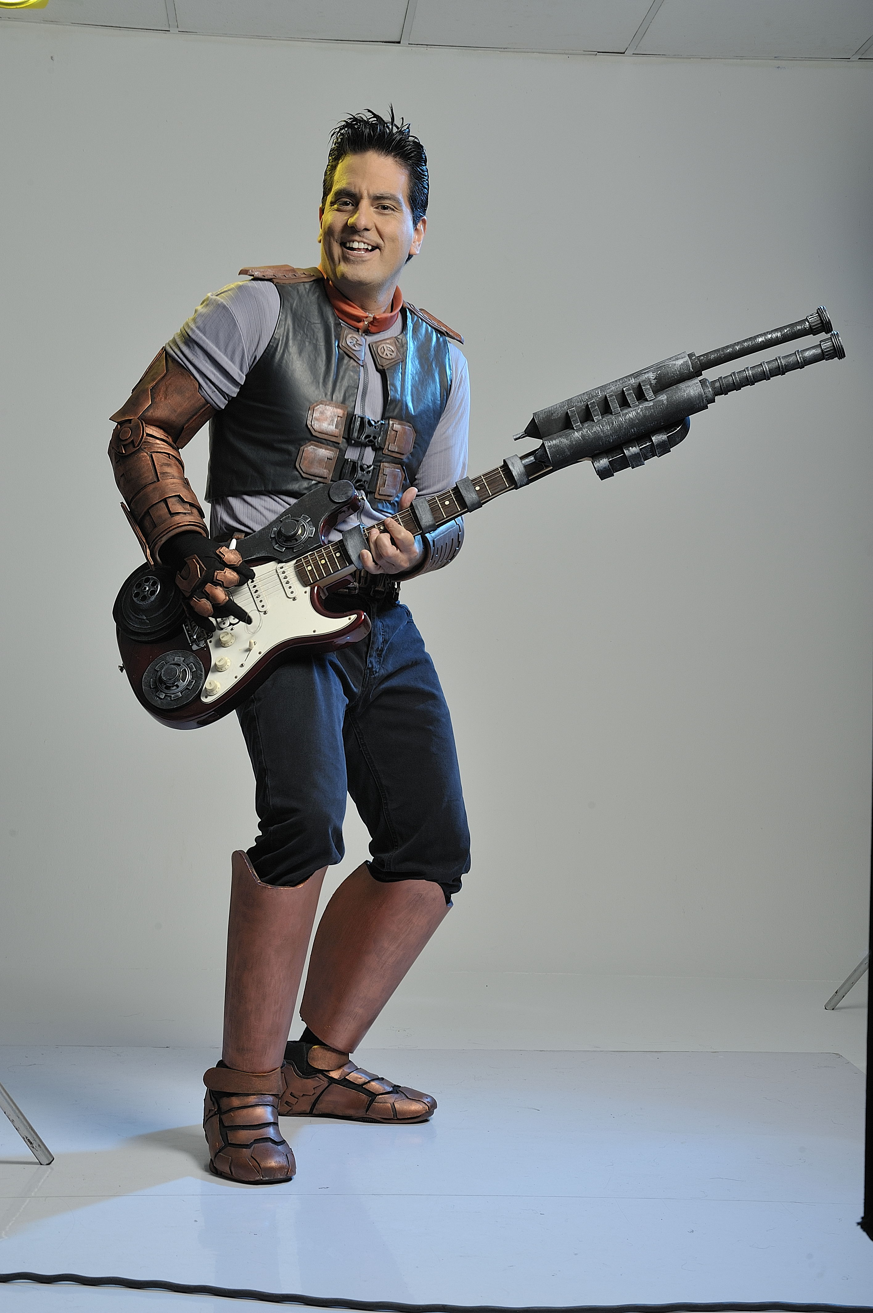 Galo Recalde interpretando al Capitán Expertus en una sesión fotográfica para el lanzamiento de la serie infantil del mismo nombre